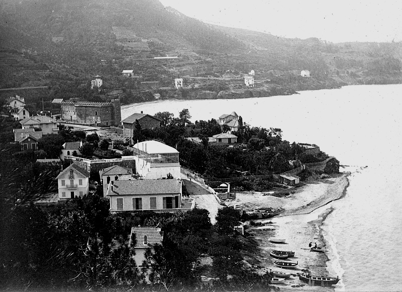 vue générale du village de théoule sur mer en Octobre 1903